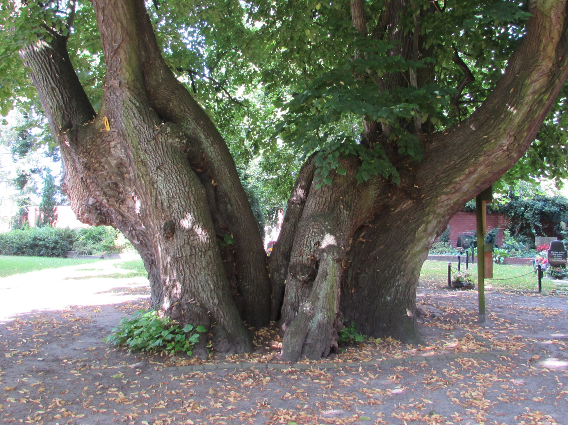 stamm der schweden linde in brielow